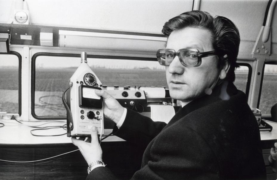 Westerterp, T.E. (KVP). Minister Westerterp van Verkeer en Waterstaat bij de ingebruikname van een meetauto (mobiele geluidmeetpost van de Rijksluchtvaartdienst) op Schiphol, aan het eind van de startbaan bij Zwanenburg. Nederland, Schiphol, Amsterdam, 20